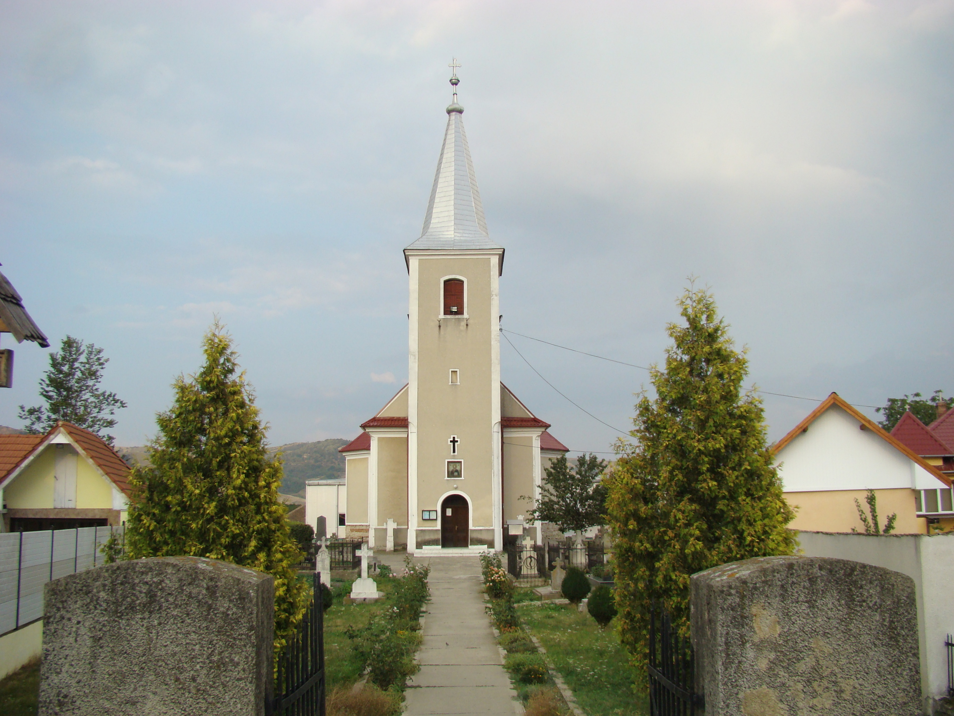 Biserica „Adormirea Maicii Domnului” din Lancrăm